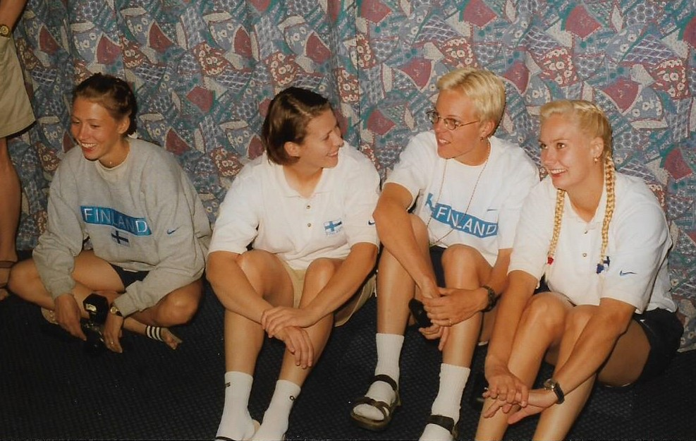 Vasemmalta aitajuoksija Petra Söderström, keihäänheittäjä Mikaela Ingberg, seitsenottelija Tiia Hautala ja moukarinheittäjä Mia Strömmer Suomen joukkueen mitalikahvitilaisuudessa yleisurheilun Euroopan-mestaruuskilpailuissa Budapestissa 23. elokuuta 1998.